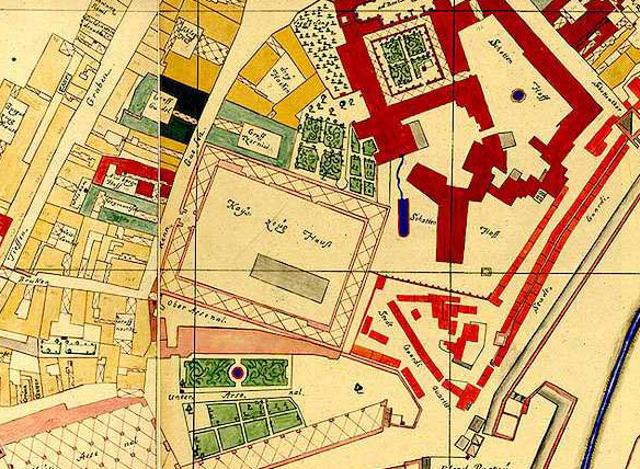 Kaiserliches Zeughaus (Oberes Arsenal) in Wien auf einer historischen Karte von 1710 (erstellt von Werner Arnold Steinhausen. Reproduktion von Gustav Adolph Schimmer von 1847)